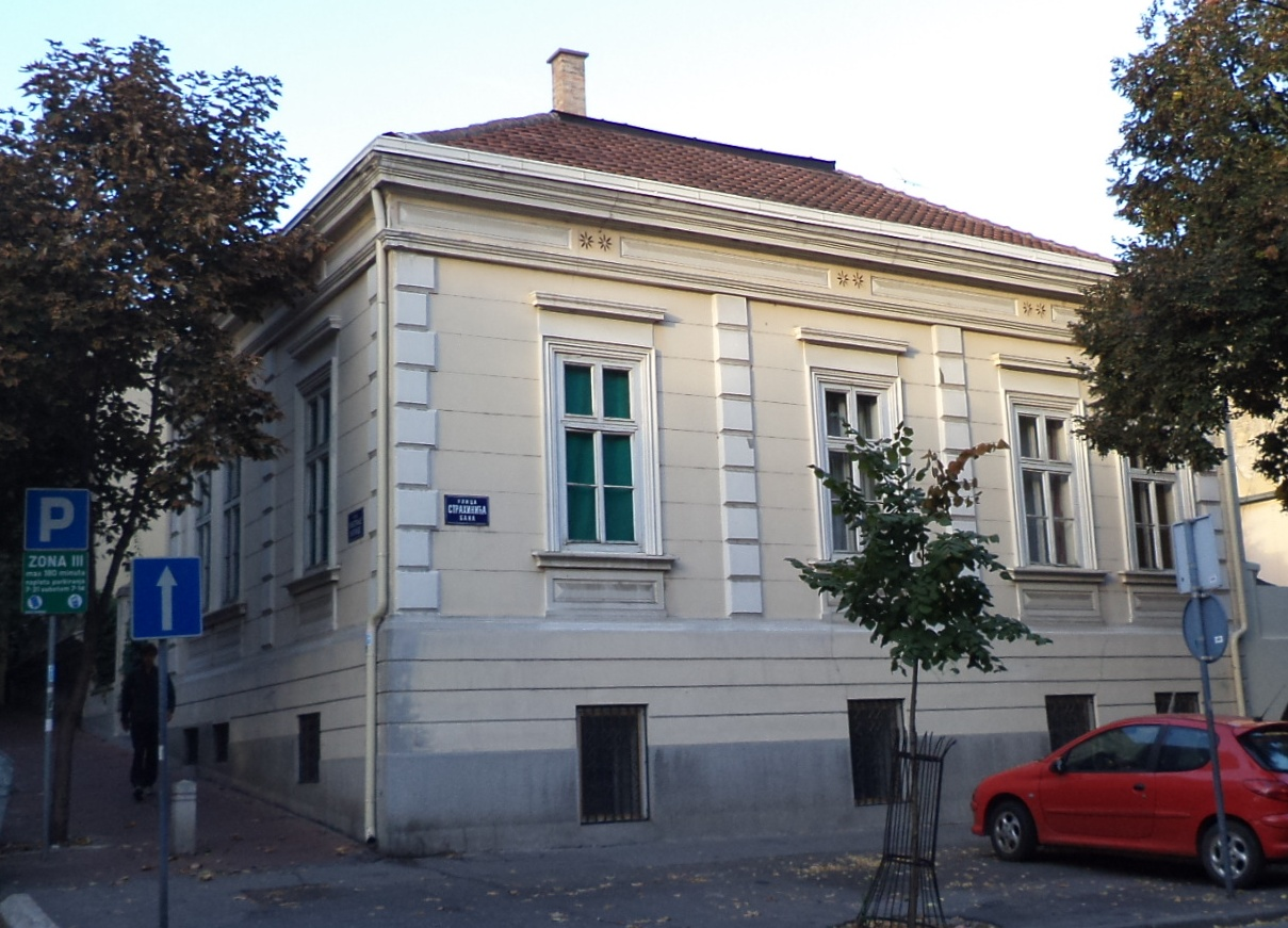 Кућа Андре Ђорђевића